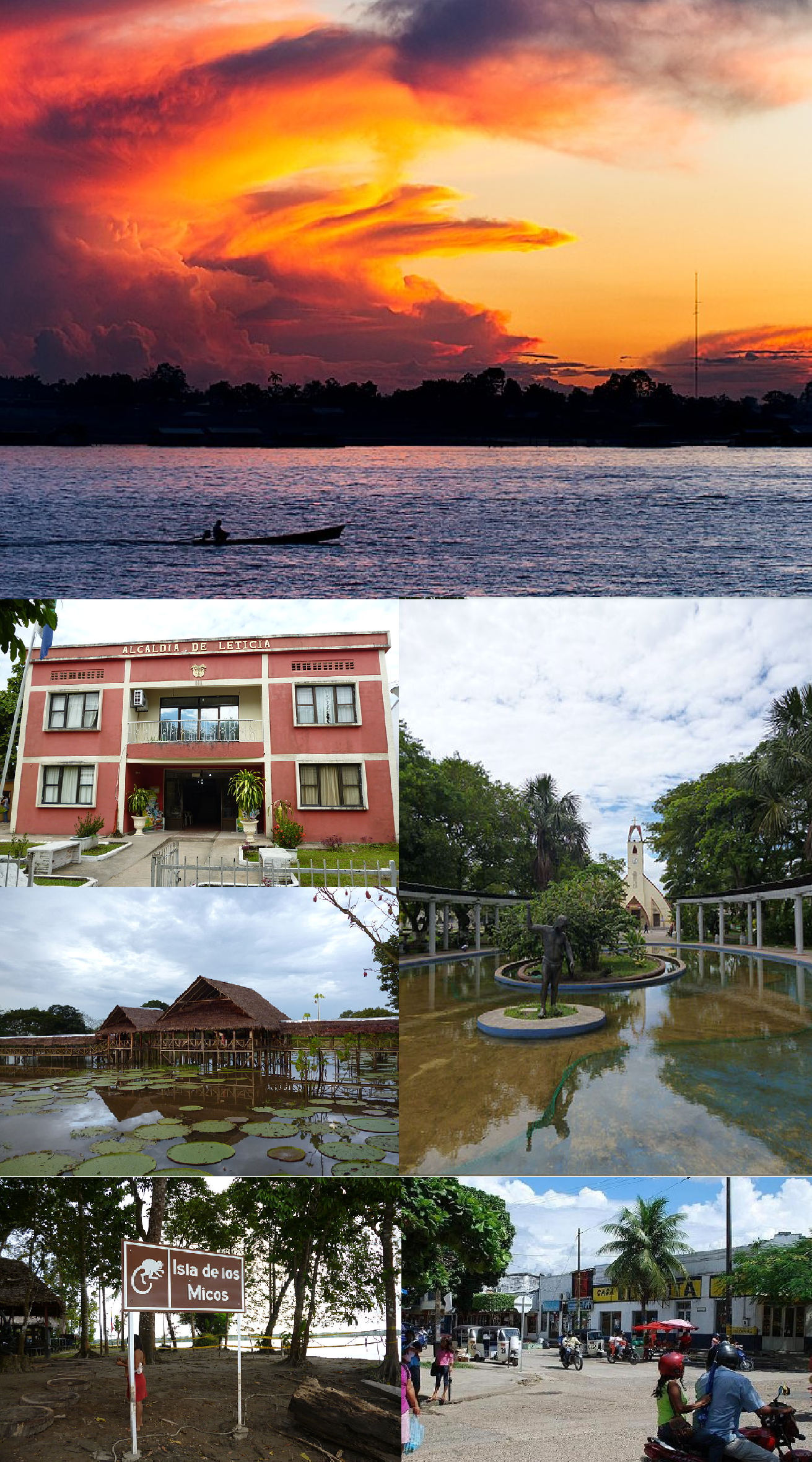 Leticia Colombia, montaje de imágenes